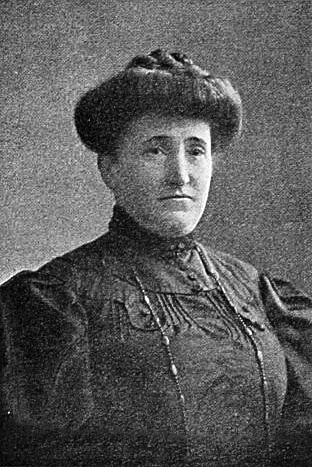 Portreto de Klara Zamenhof, la edzino de LLZ.